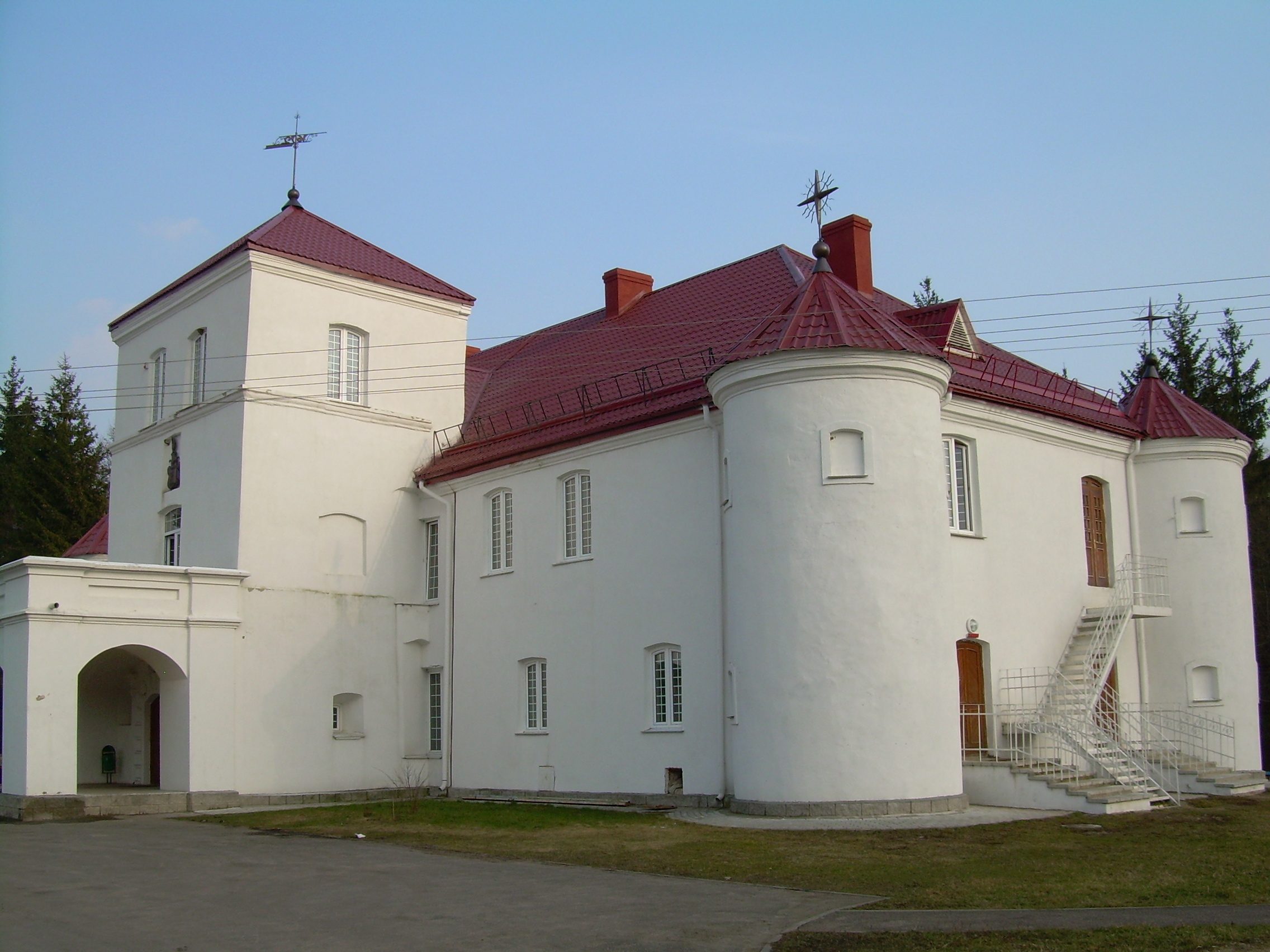 Беларуская (тарашкевіца): Дом-крэпасьць. в. Гайцюнішкі This is a photo of Belarusian heritage monument. Reference number: 412Г000127 ( WLM)